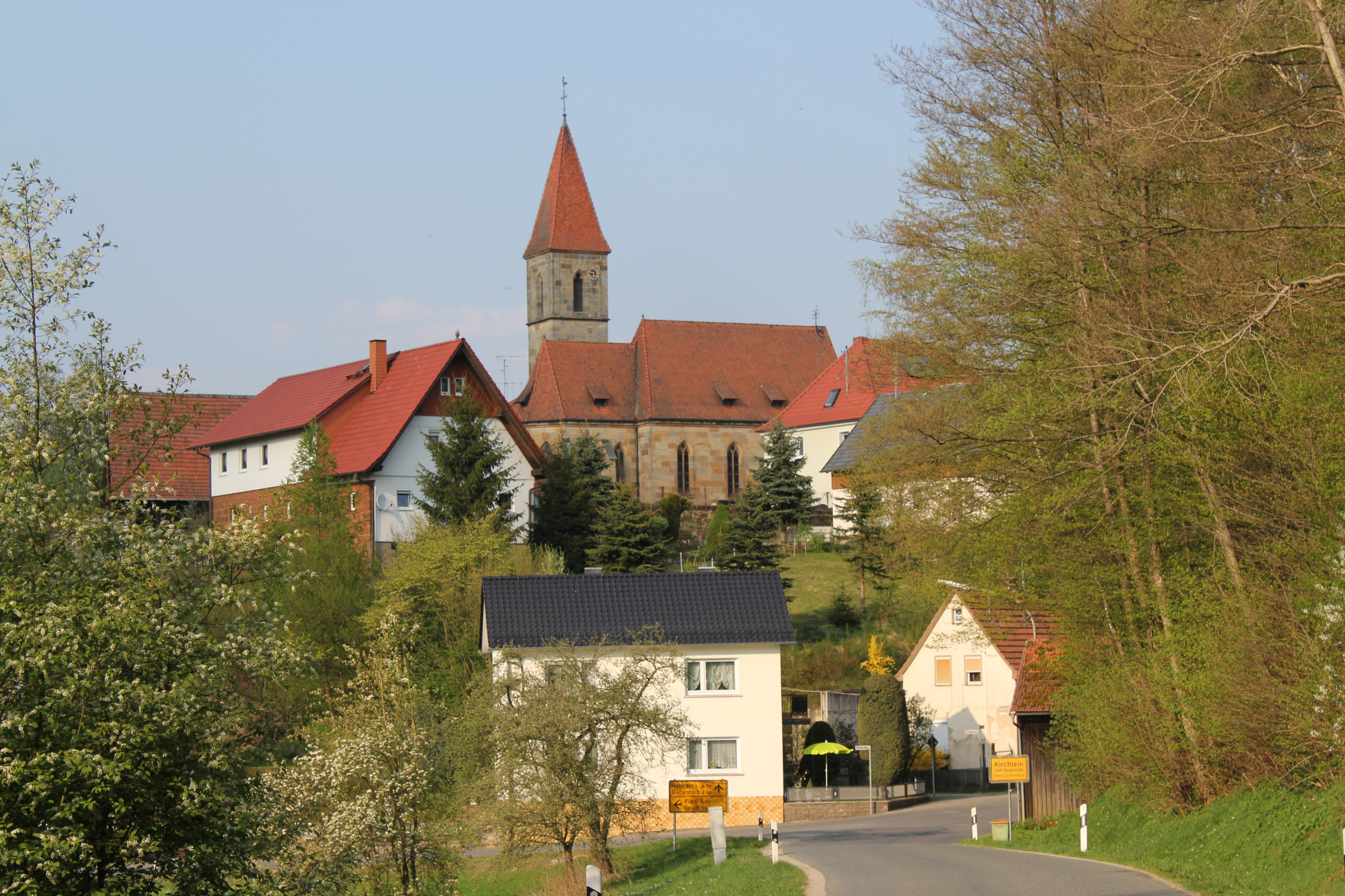 Südwestliche Ortsansicht von Kirchlein